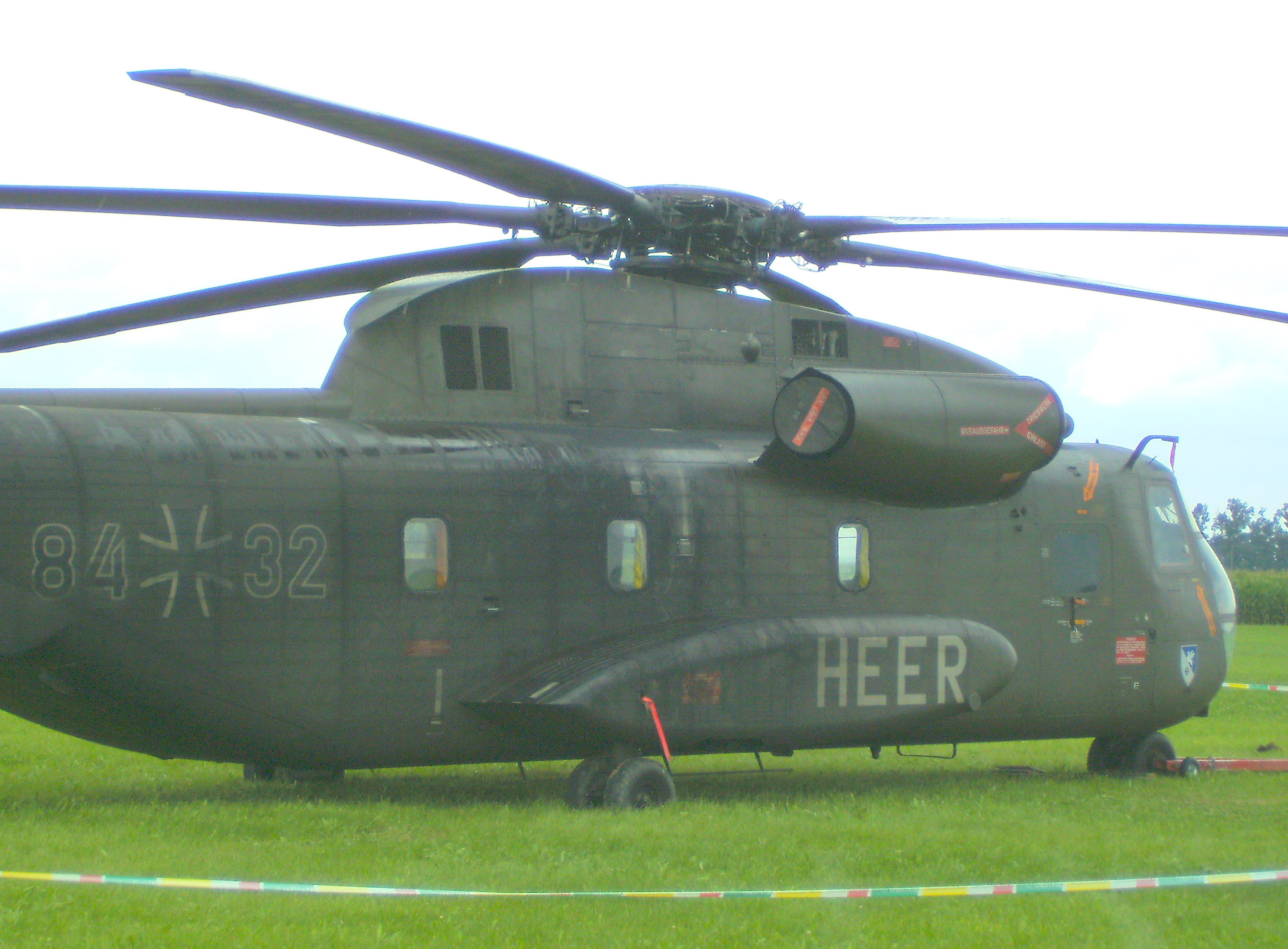 Tannkosh 2008, Transporthubschrauberregiment 25